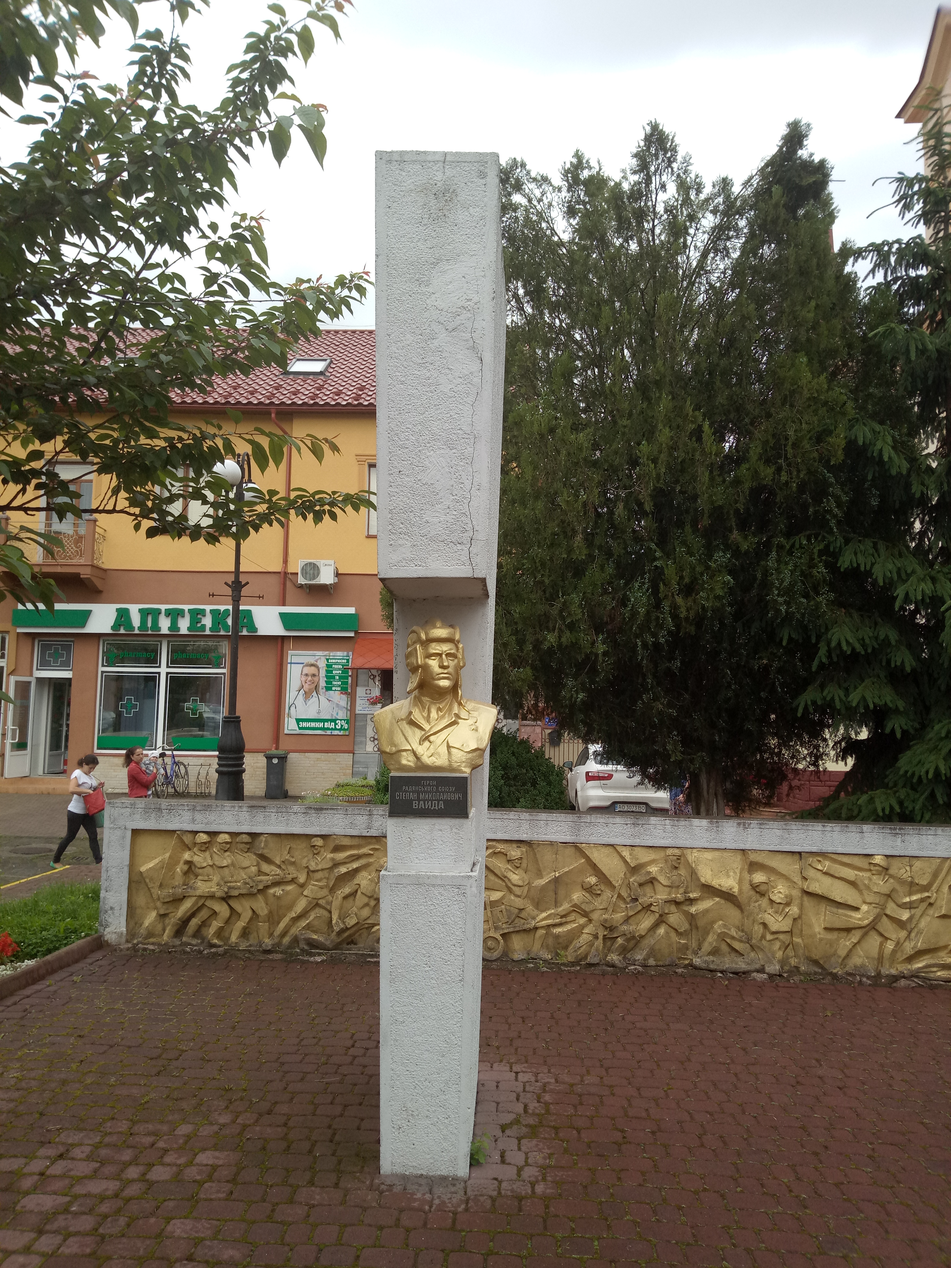 фото пам'ятника С. Вайді в м. Тячів